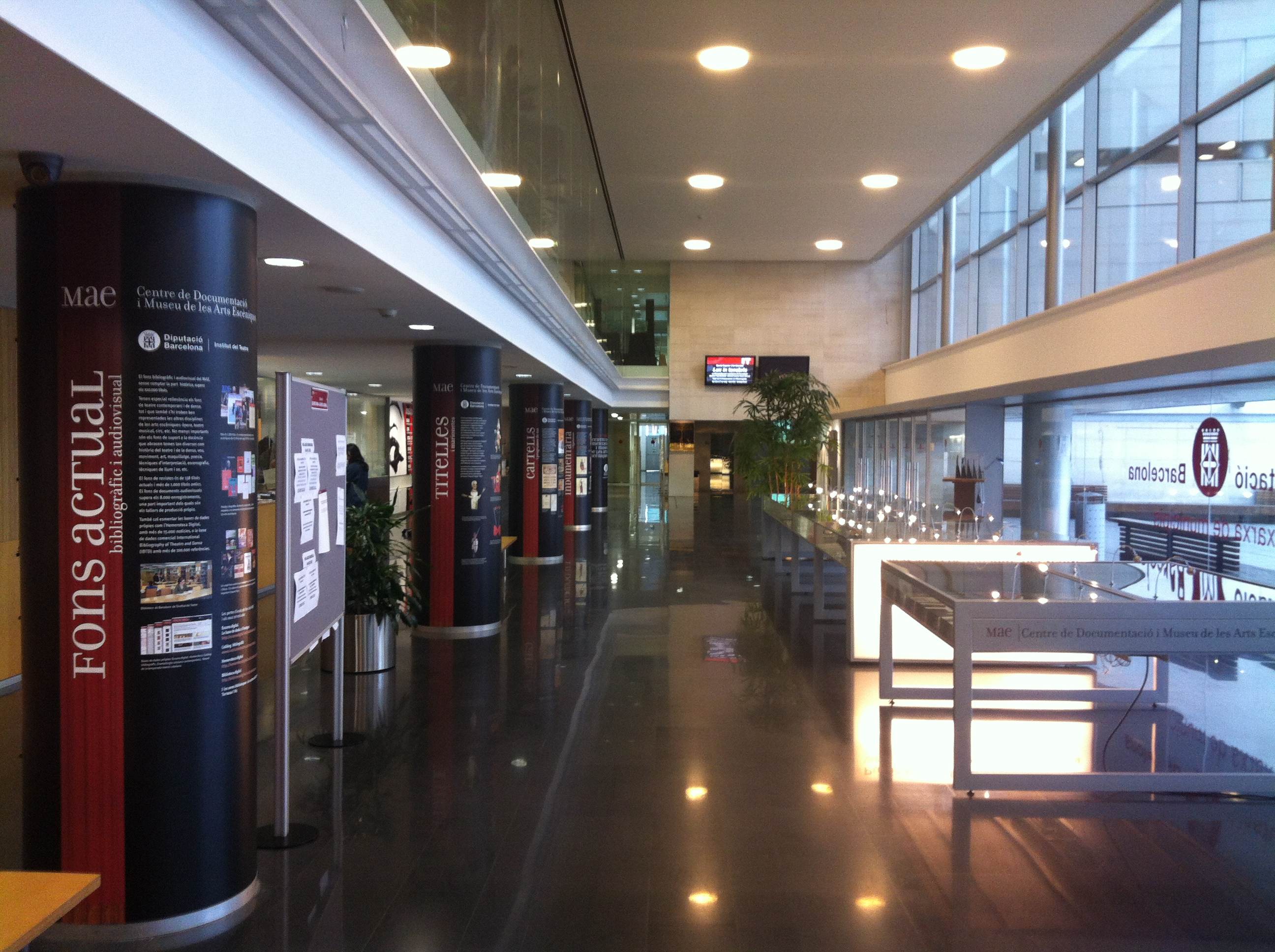 Museu de les Arts Escèniques hall